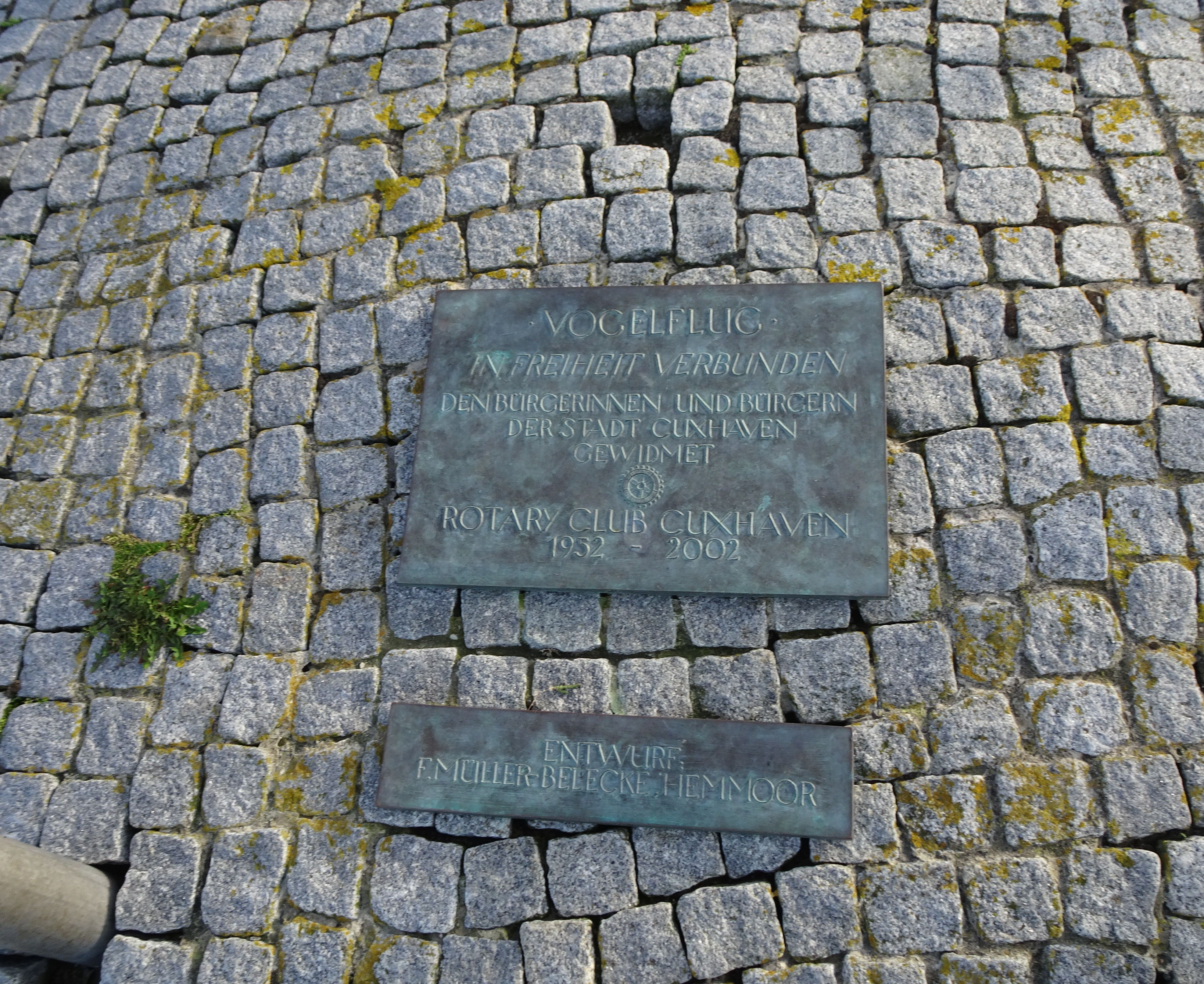 Skulptur Vogelflug in Cuxhaven, Nähe Alte Liebe